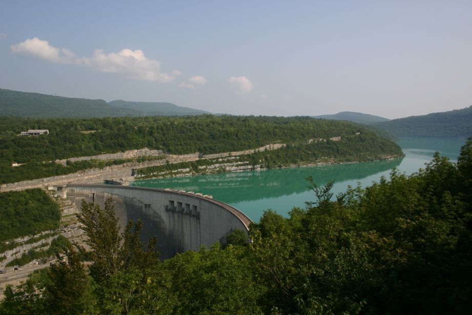 Barrage du lac de Vouglans dans le Jura en France